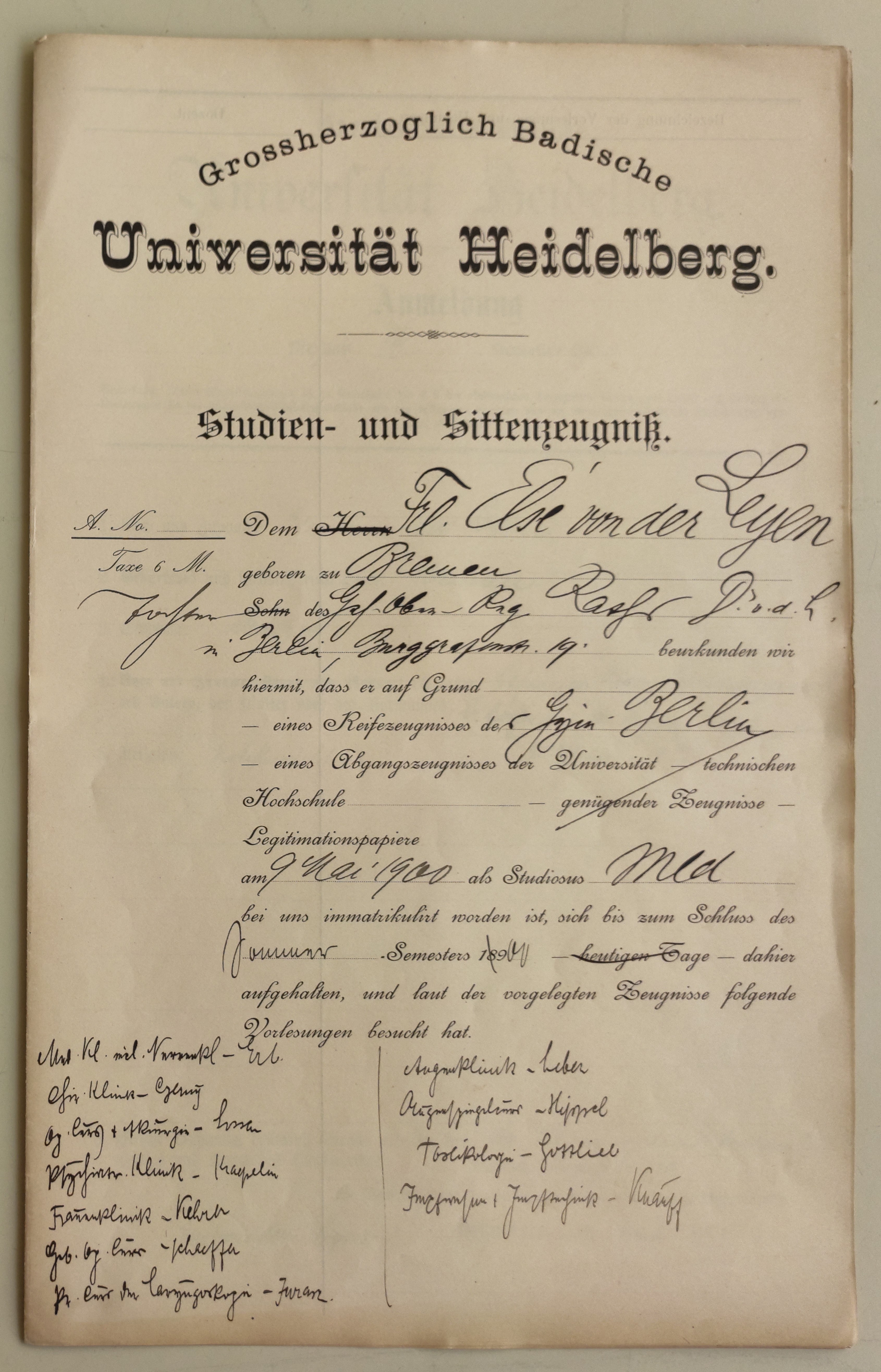 Studien- und Sittenzeugnis von Else von der Leyen